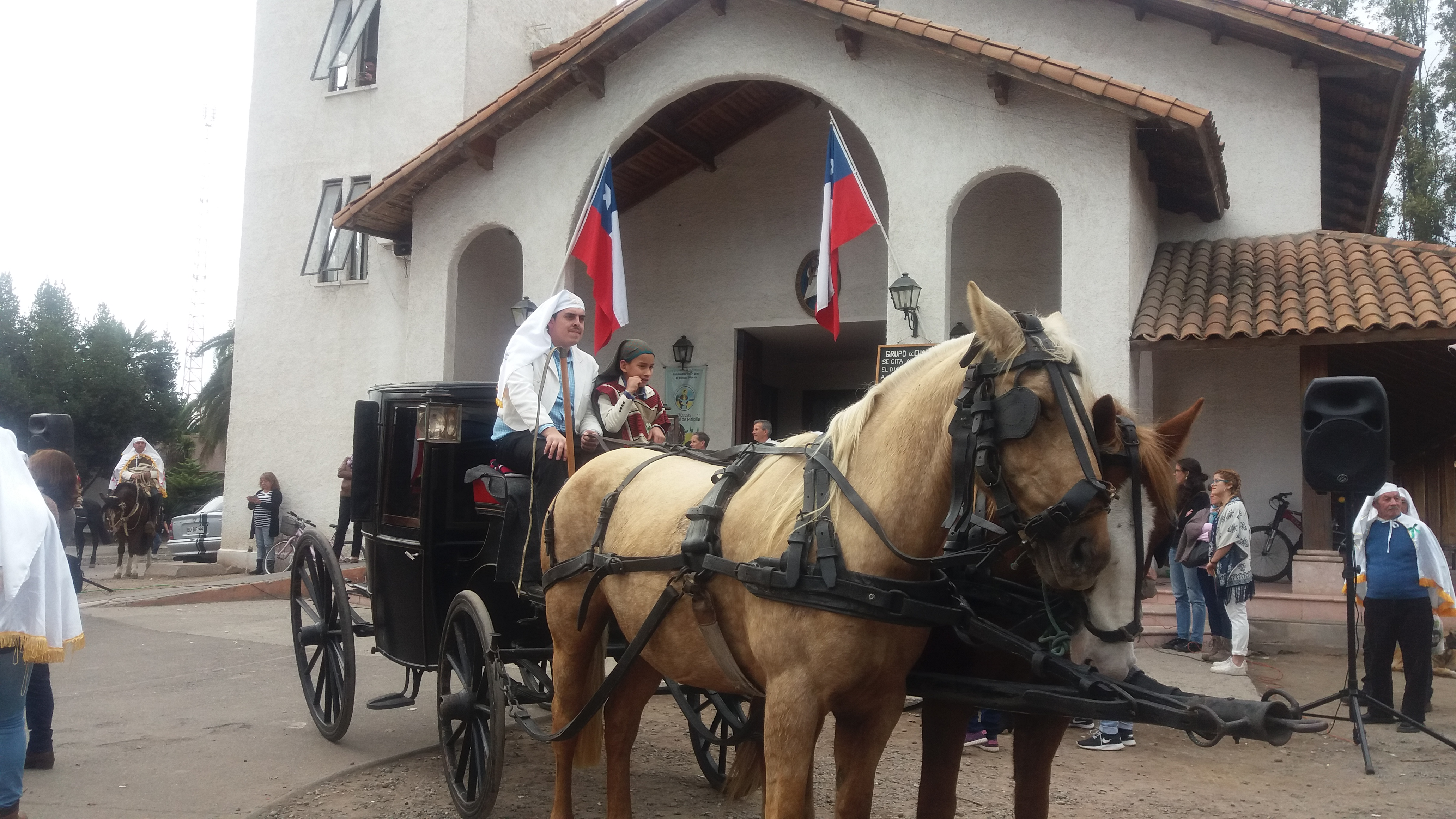 Fiesta de Cuasimodo parroquia Niño Dios De Malloco